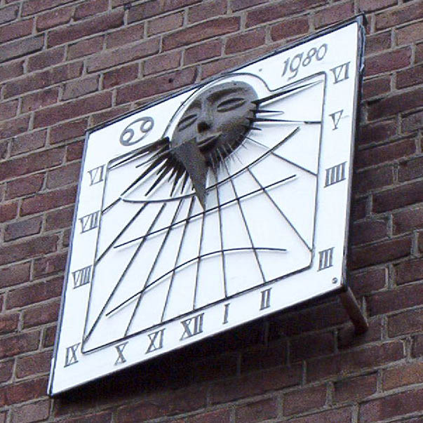 Zonnewijzer Kannerweg Maastricht